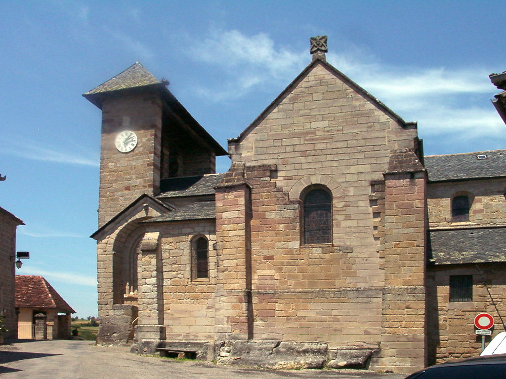 Curemonte ,Correze, un des plus beaux village de France